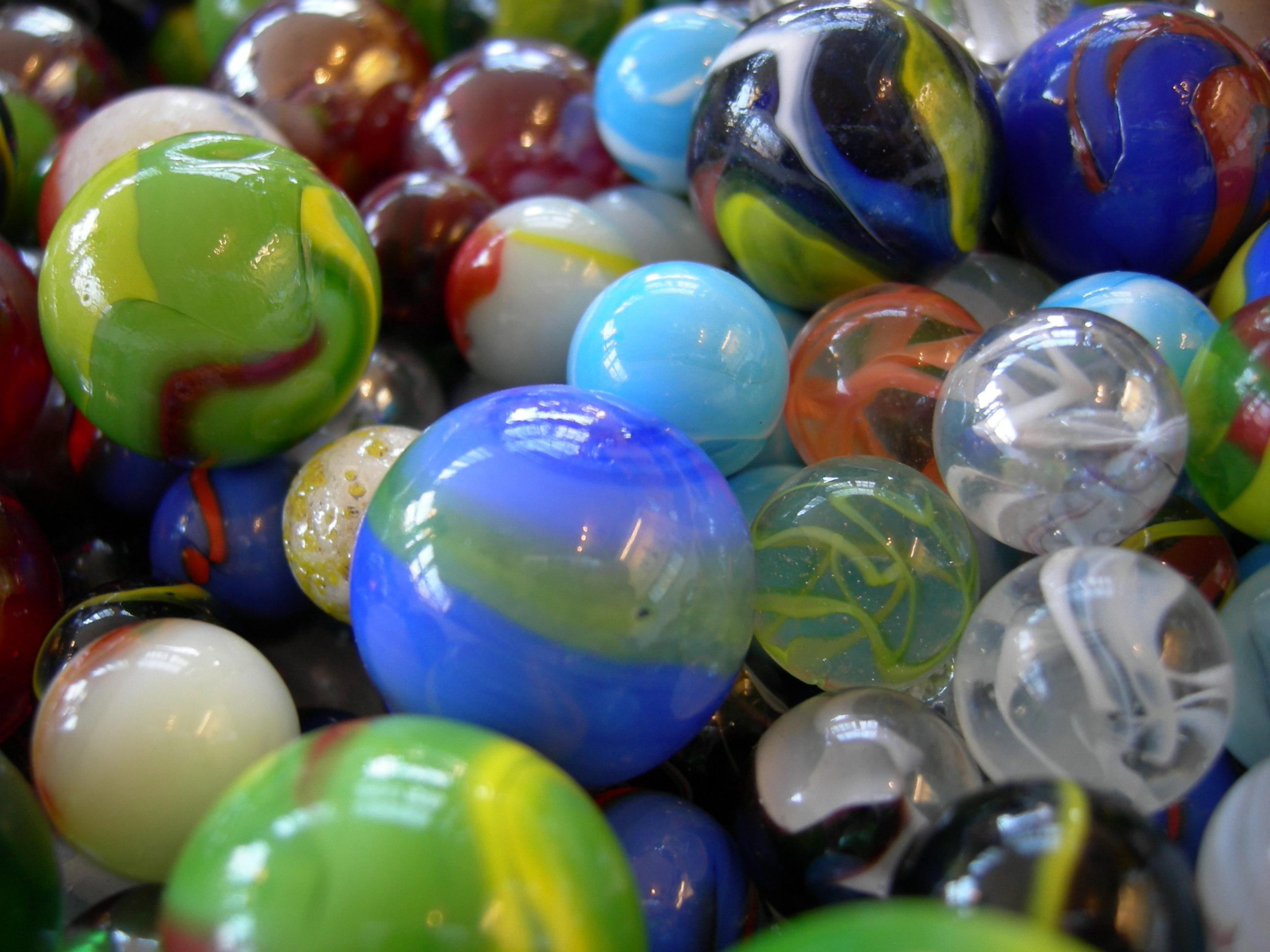 Marbles